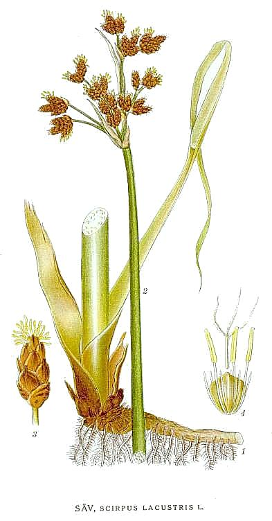 Schoenoplectus lacustris (L.) Palla, syn. Scirpus lacustris L. Original Description Säv, Scirpus lacustris L.